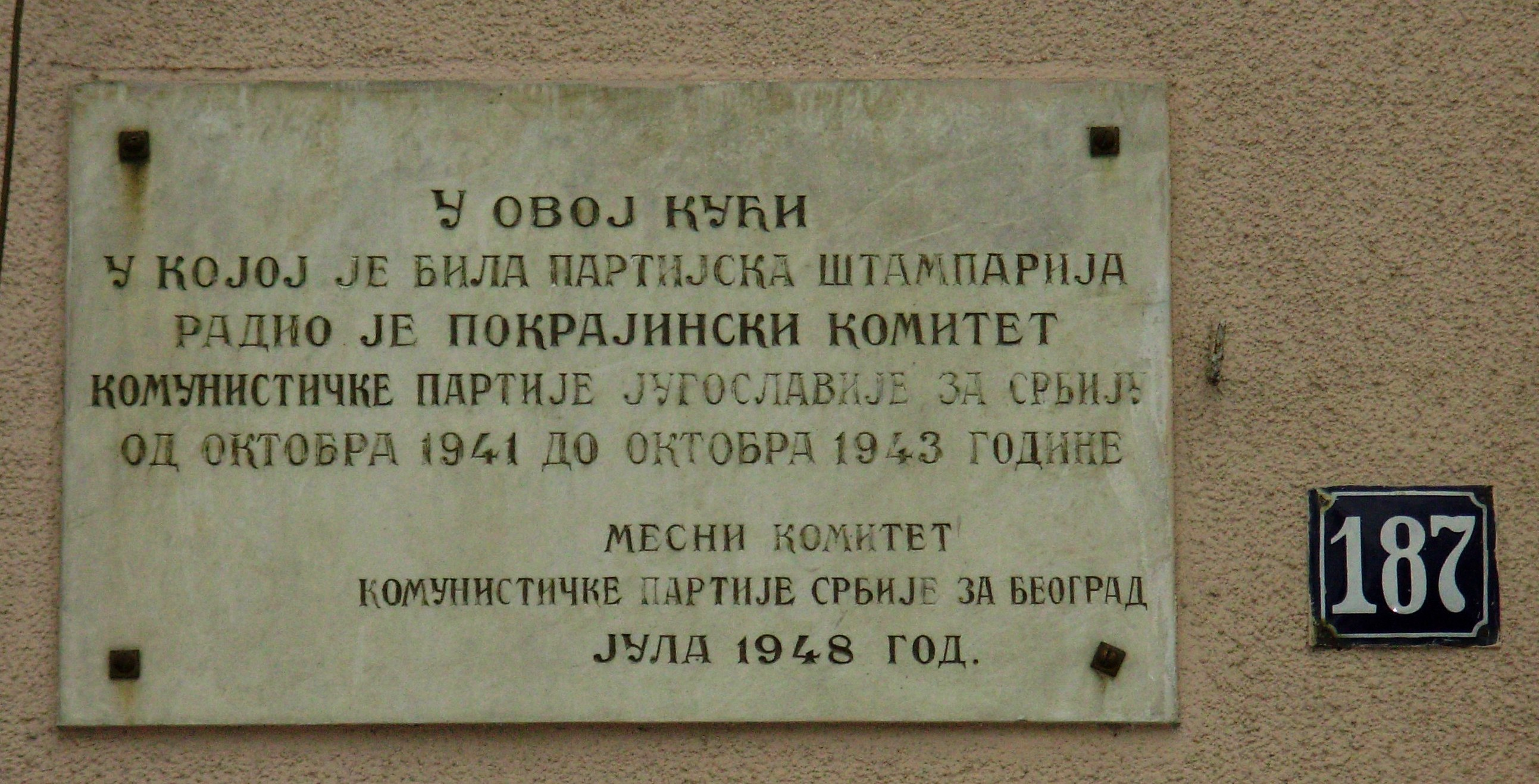 Табла на згради број 187 у Булевару ослобођења, Београд. Сликао Голдфингер